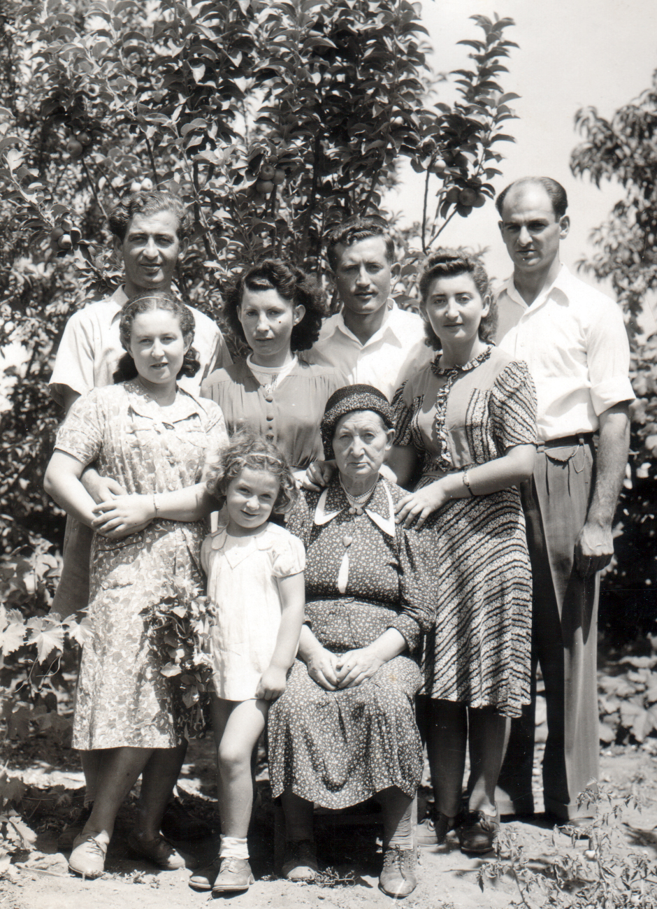 מלכה ברוורמן ומשפחתה - מלכה עומדת מימין, האם (יושבת), אחיה אייזיק ואריה ובני משפחה נוספים